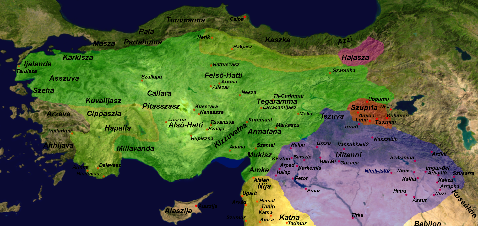 Anatólia térképe I. Tudhalijasz és I. Arnuvandasz alatt.